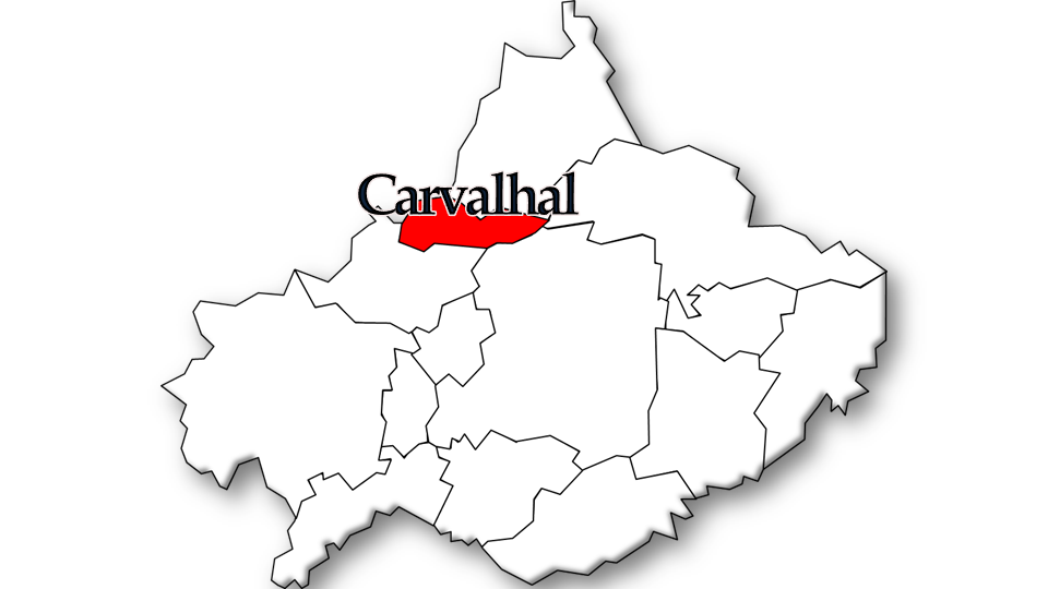 População